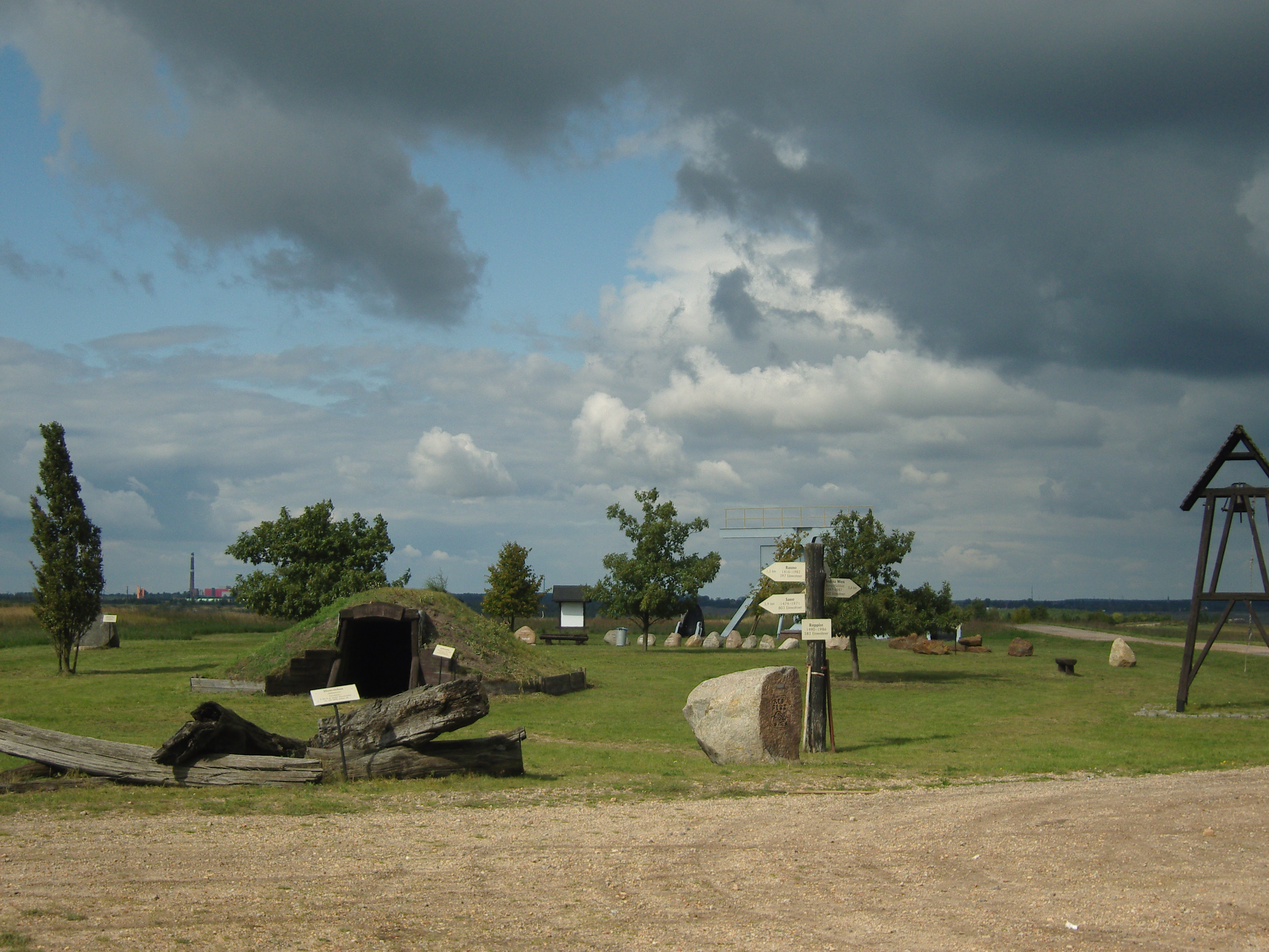 Aussichtspunkt am devastierten Ort Reppist bei Senftenberg, Erinnerung an die durch den Braunkohletagebau abgebaggerten Orte